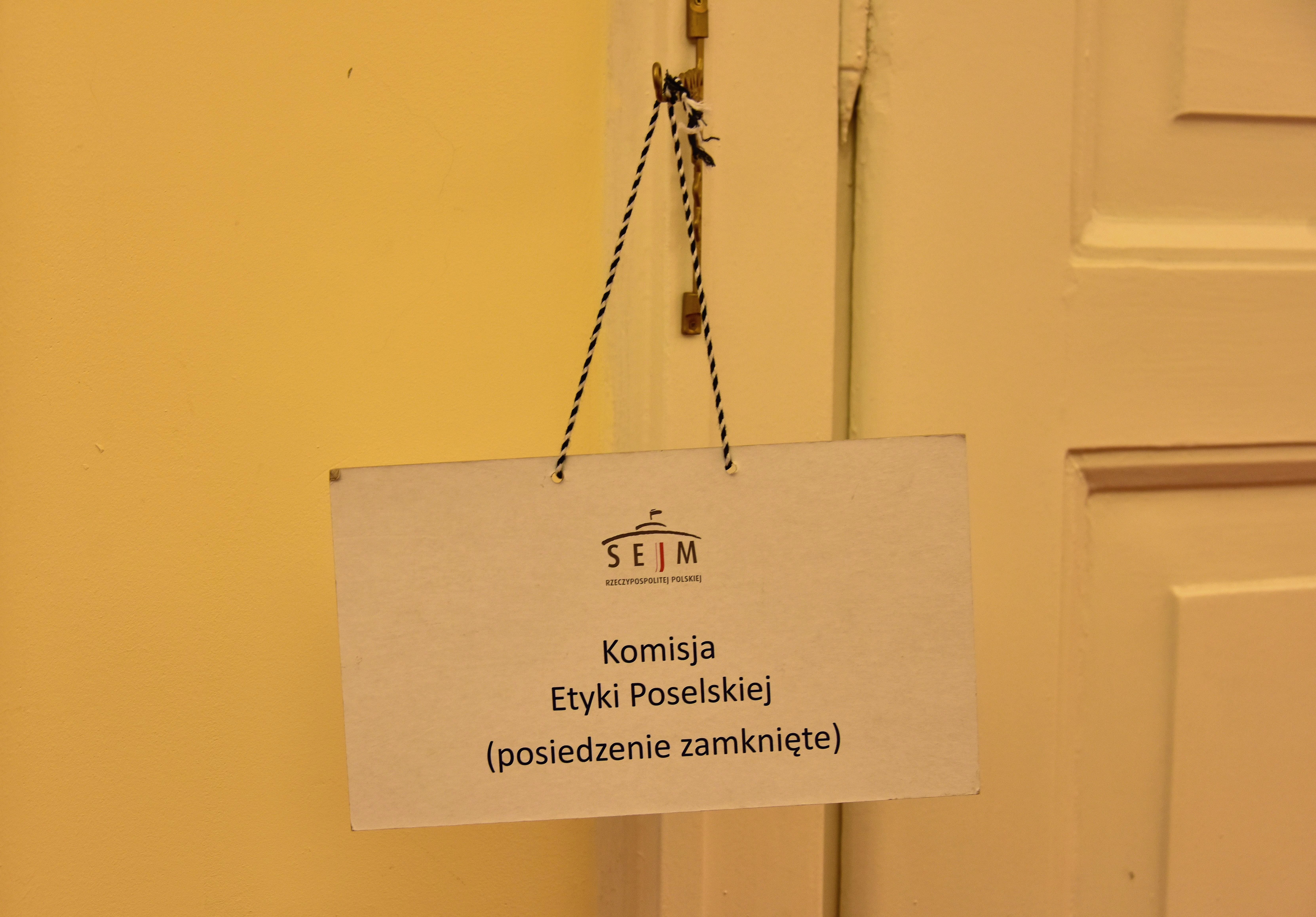 Informacja o trwającym posiedzeniu Komisji Etyki Poselskiej w Sejmie